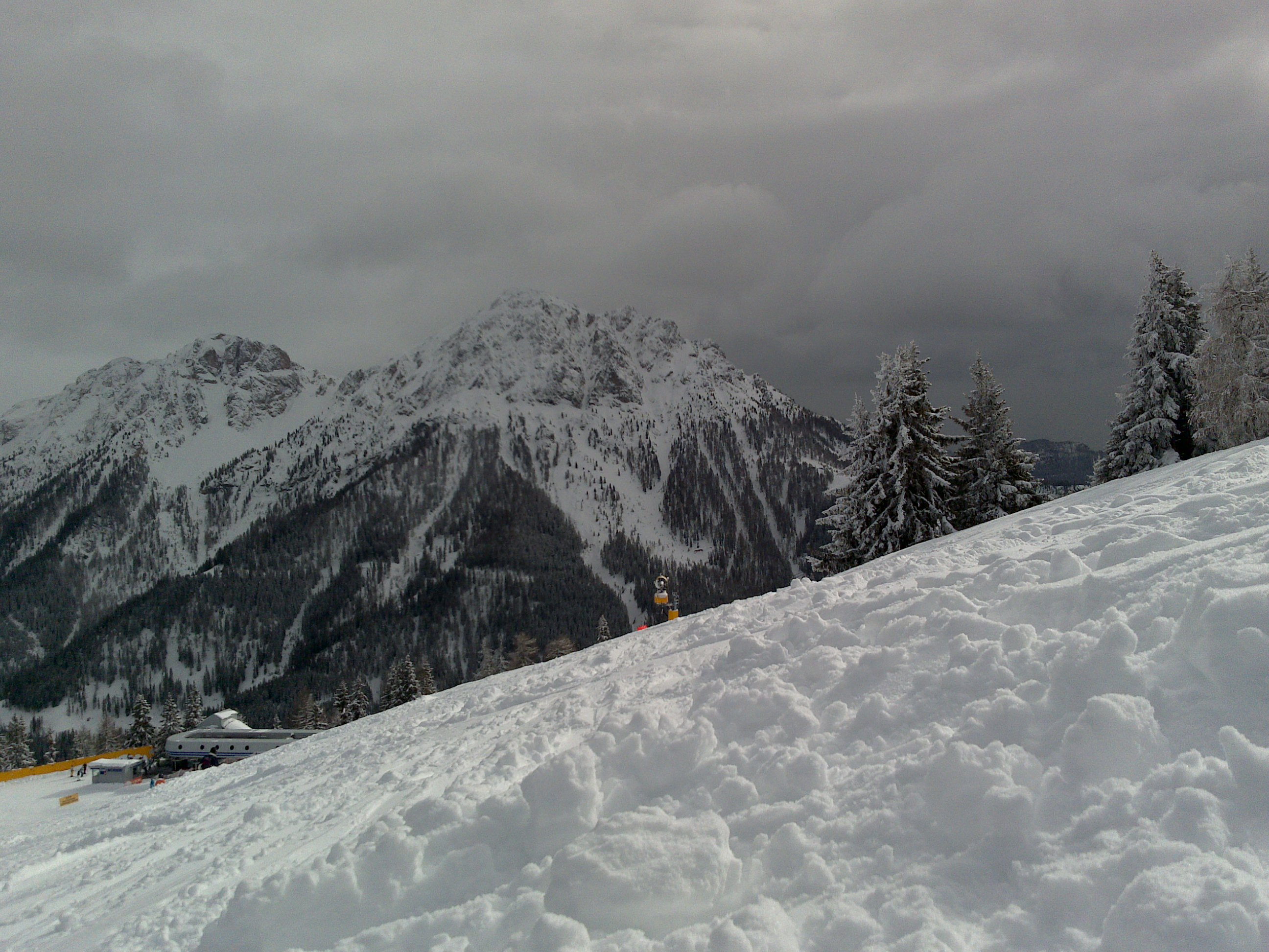 kronplatz